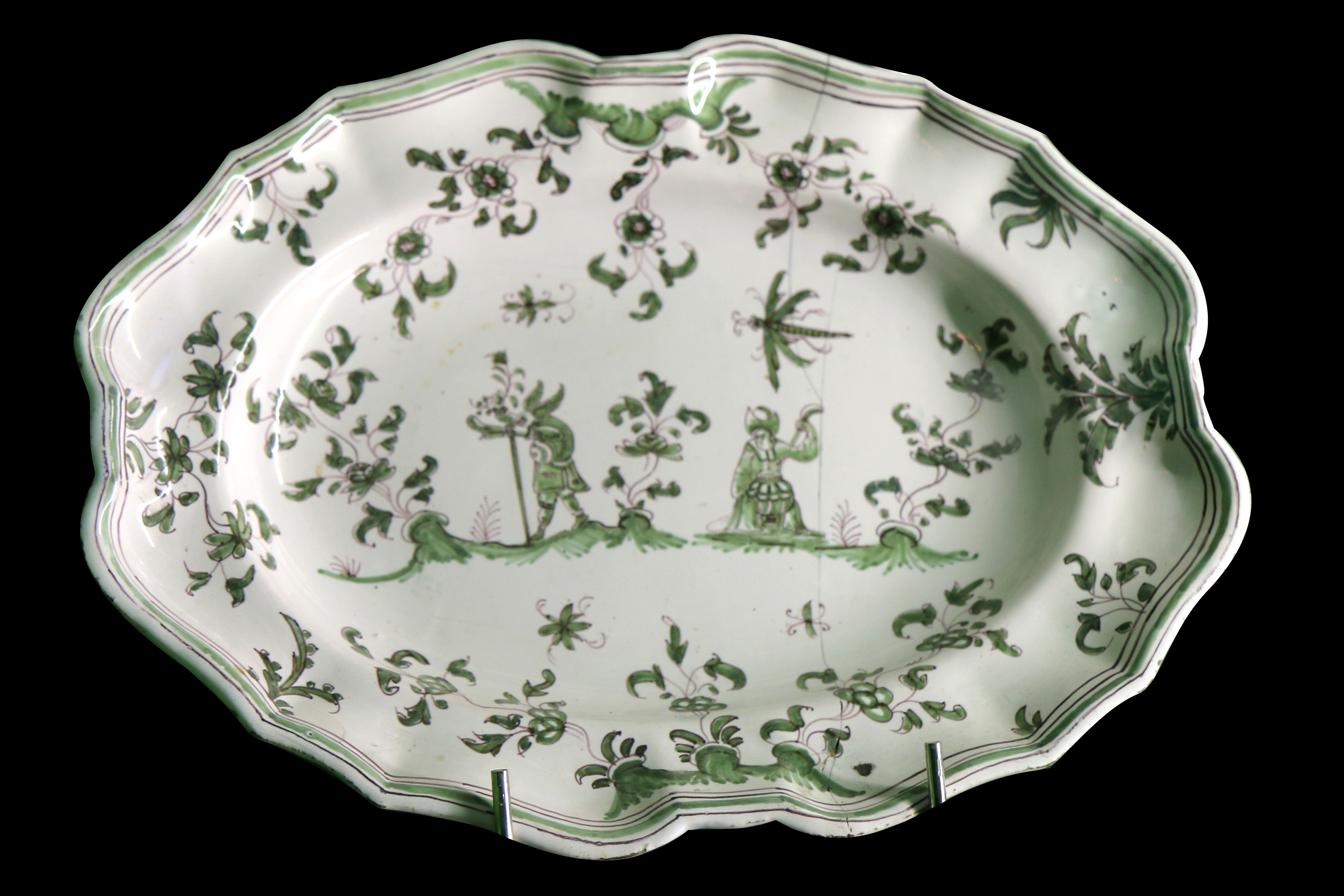 Plat oblong à bord contourné, décor de grand feu vert et manganèse à grotesques, fond animé d'une libellule et insectes, tertres de feuillages et fleurs débordant sur l'aile, filets de manganèse. Faîence de Moustiers, XVIIIe siècle.